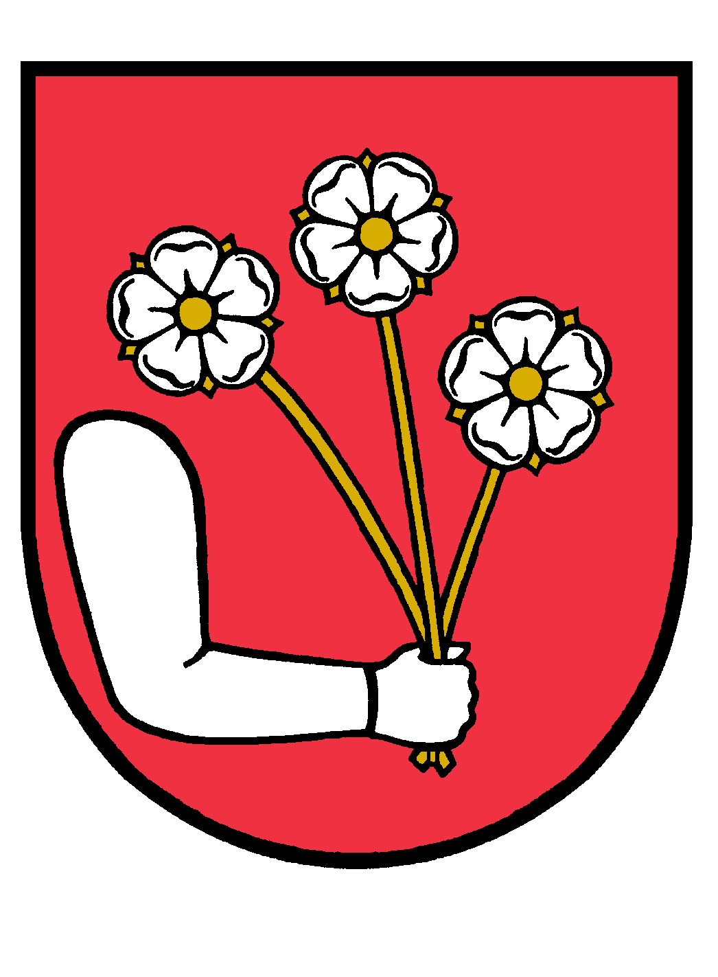 Golianovo Erb